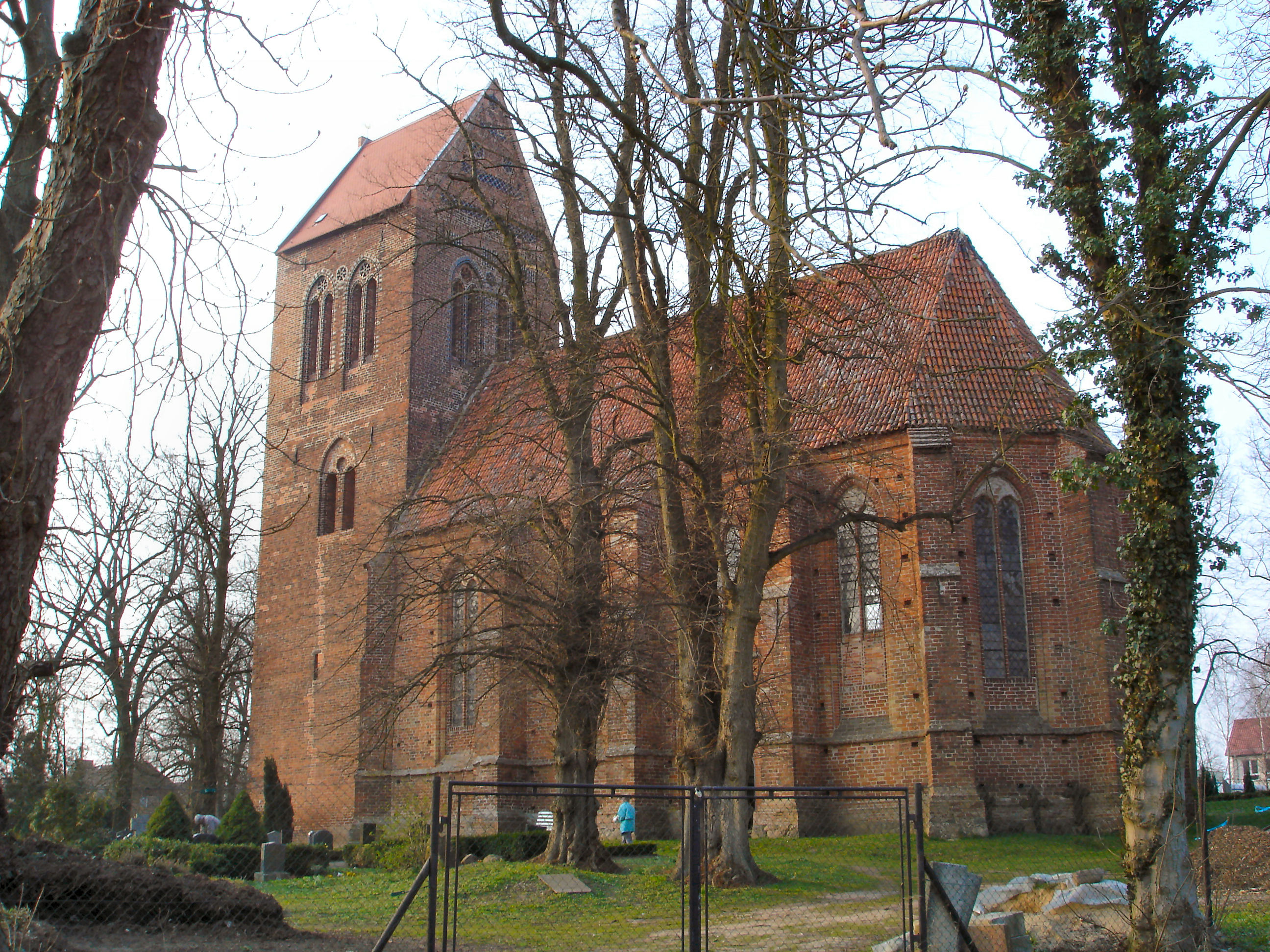 Kirche in Zurow bei Wismar / Church in Zurow near Wismar (Mecklenburg-Western Pomerania)